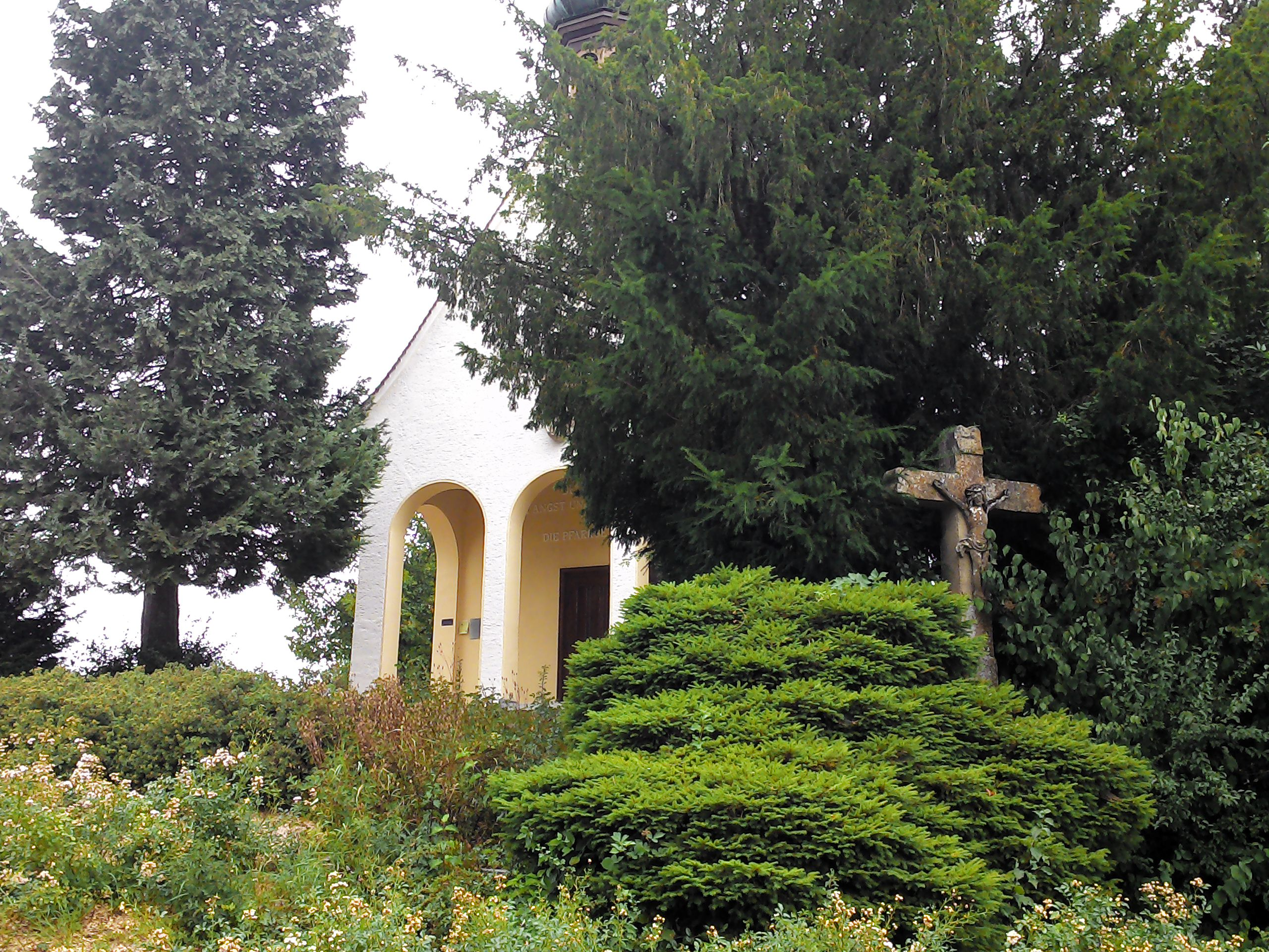 Die Bergkapelle von Erzingen, Gemeinde Klettgau, Landkreis Waldshut in Baden-Württemberg. Errichtet aufgrund eines Gelübdes 1945. In der Nähe ein Sühnekreuz von 1671.